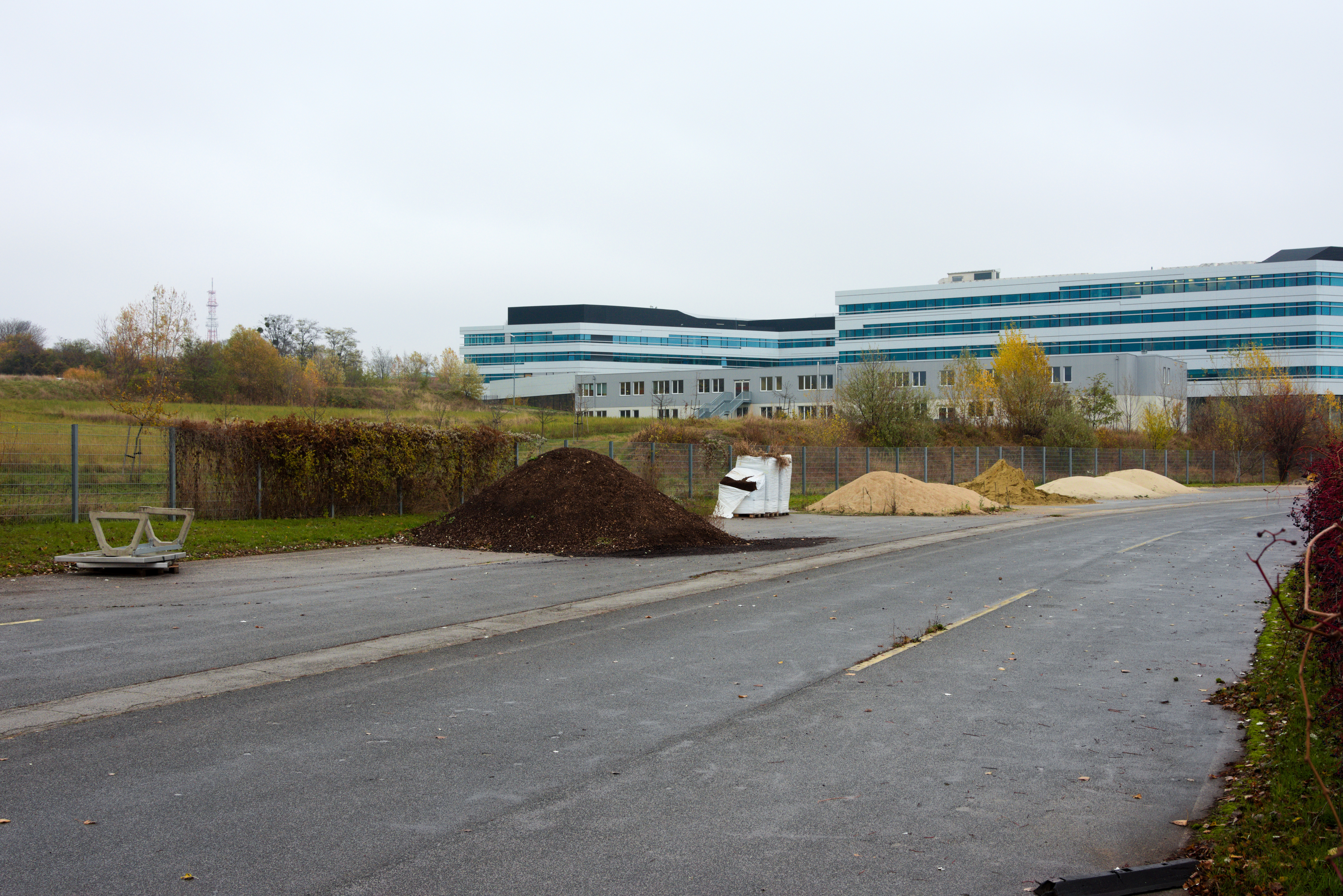 Trasse der ehemaligen Anschlussstelle Favoriten der A23, Blickrichtung Favoritenstraße